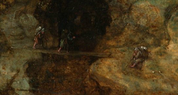 Ausschnitt aus Pieter Bruegels Gemälde Landschaft mit der Flucht nach Ägypten